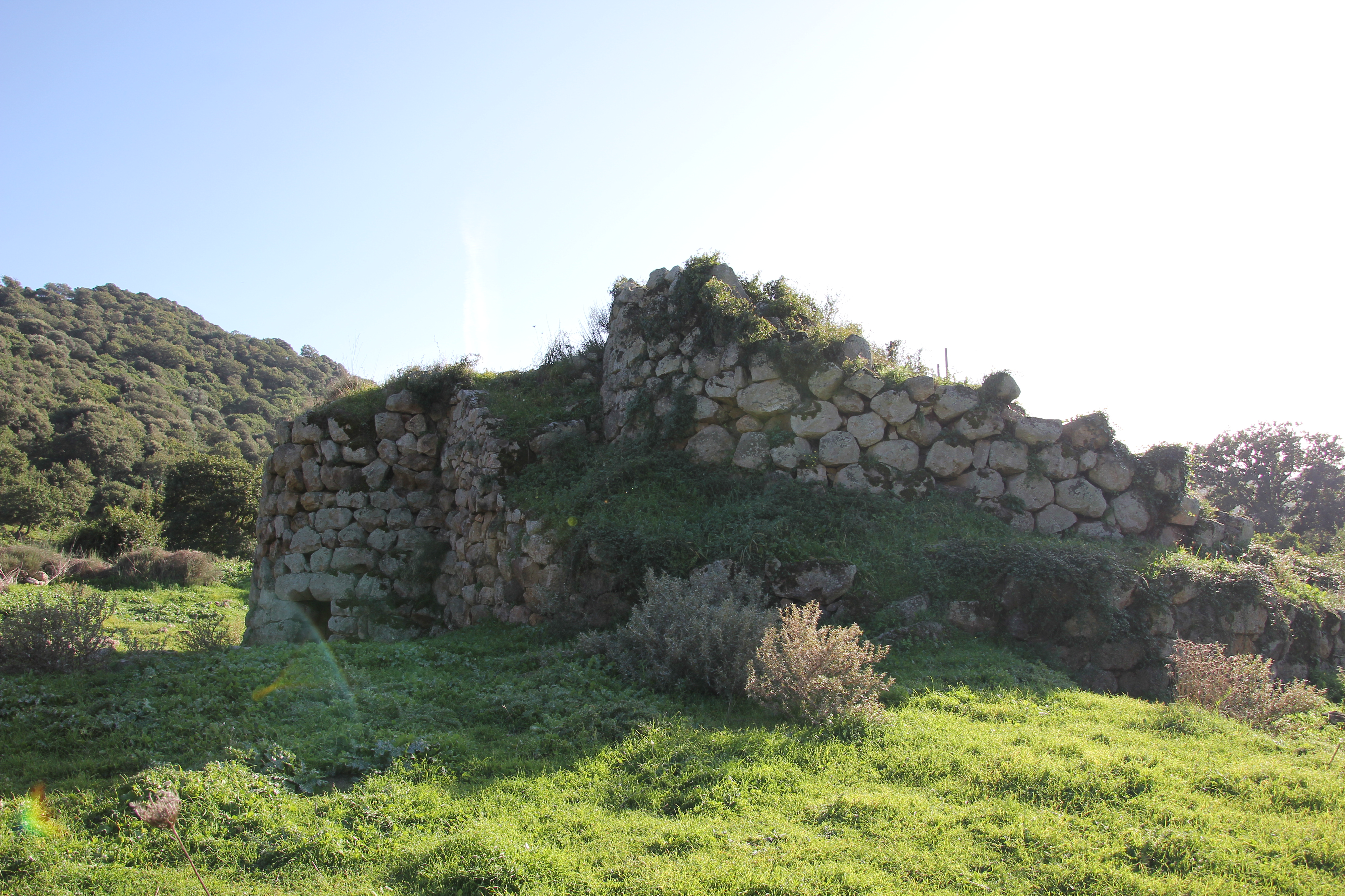 Ittireddu, nuraghe Funtana